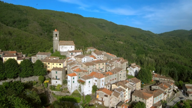 Panorama